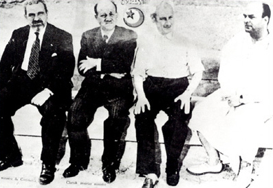 Mohamed Salah Mzali, M'hamed Chenik, Mahmoud El Materi et Mohamed Ben Salem en résidence forcée dans le Sud tunisien